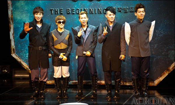 울랄라세션 첫번째 단독 콘서트 발표회